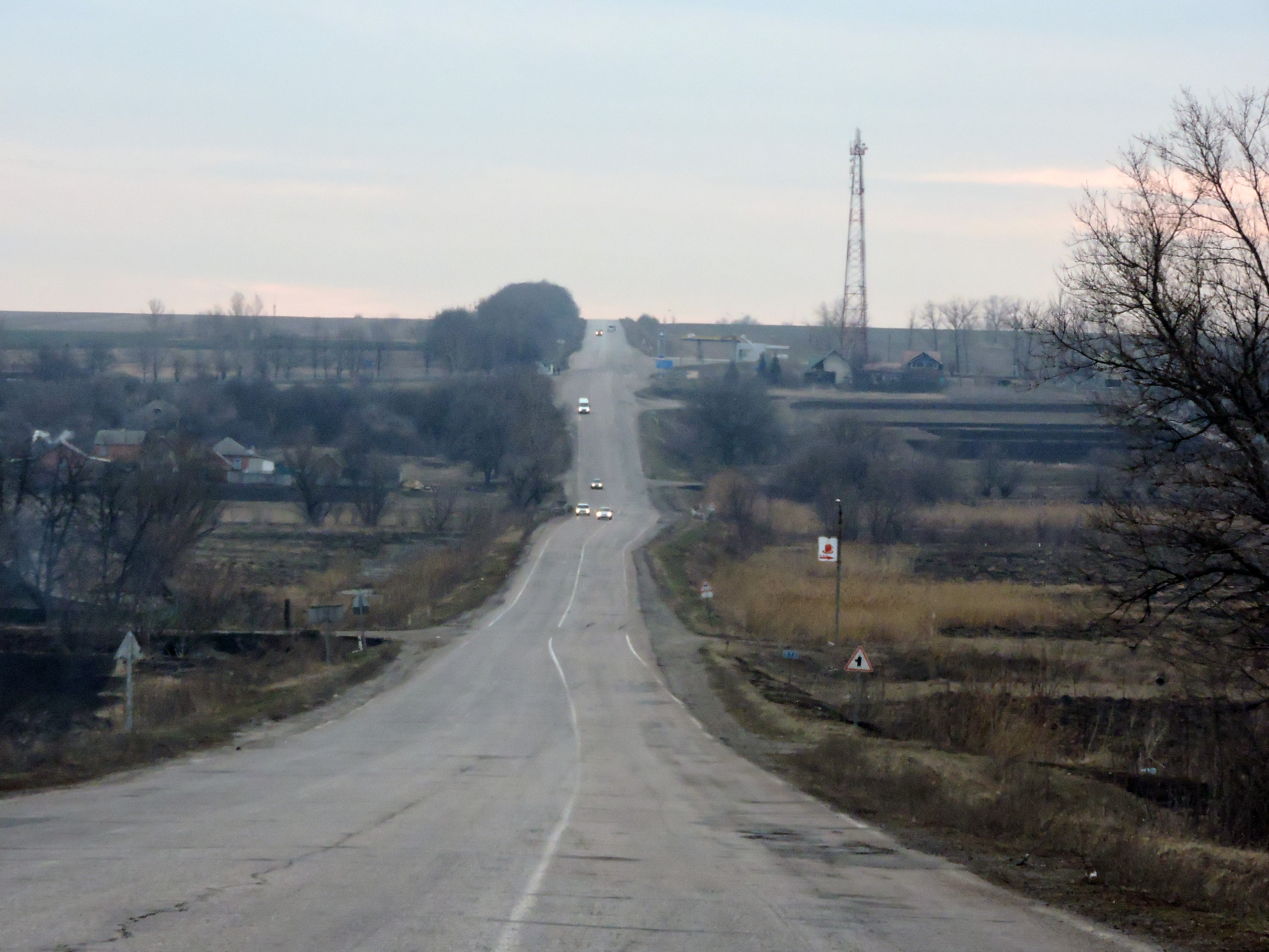 Вид на село Волохів Яр з автошляху М 03 (березень 2015 року)